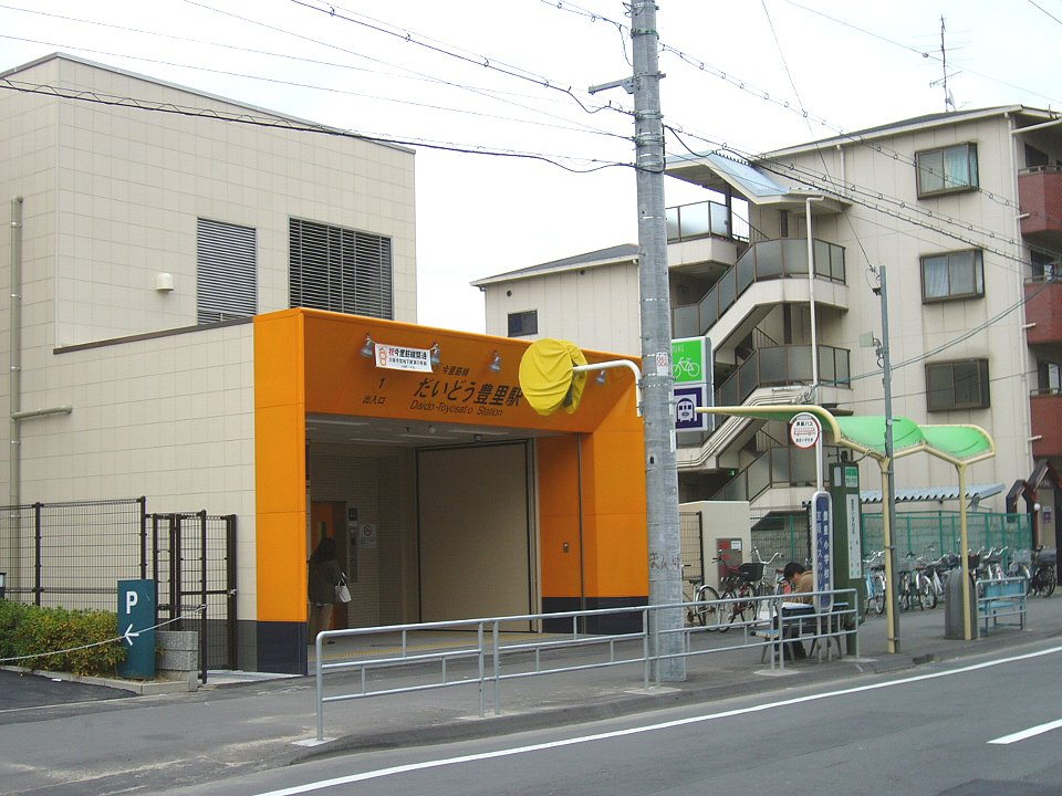 だいどう豊里駅1号出入口 2006年12月24日 Bakkai撮影